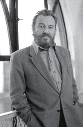 L'acteur et metteur en scène André Pomarat, directeur du Théâtre Jeune Public, au TJP Petite Scène en 1991.